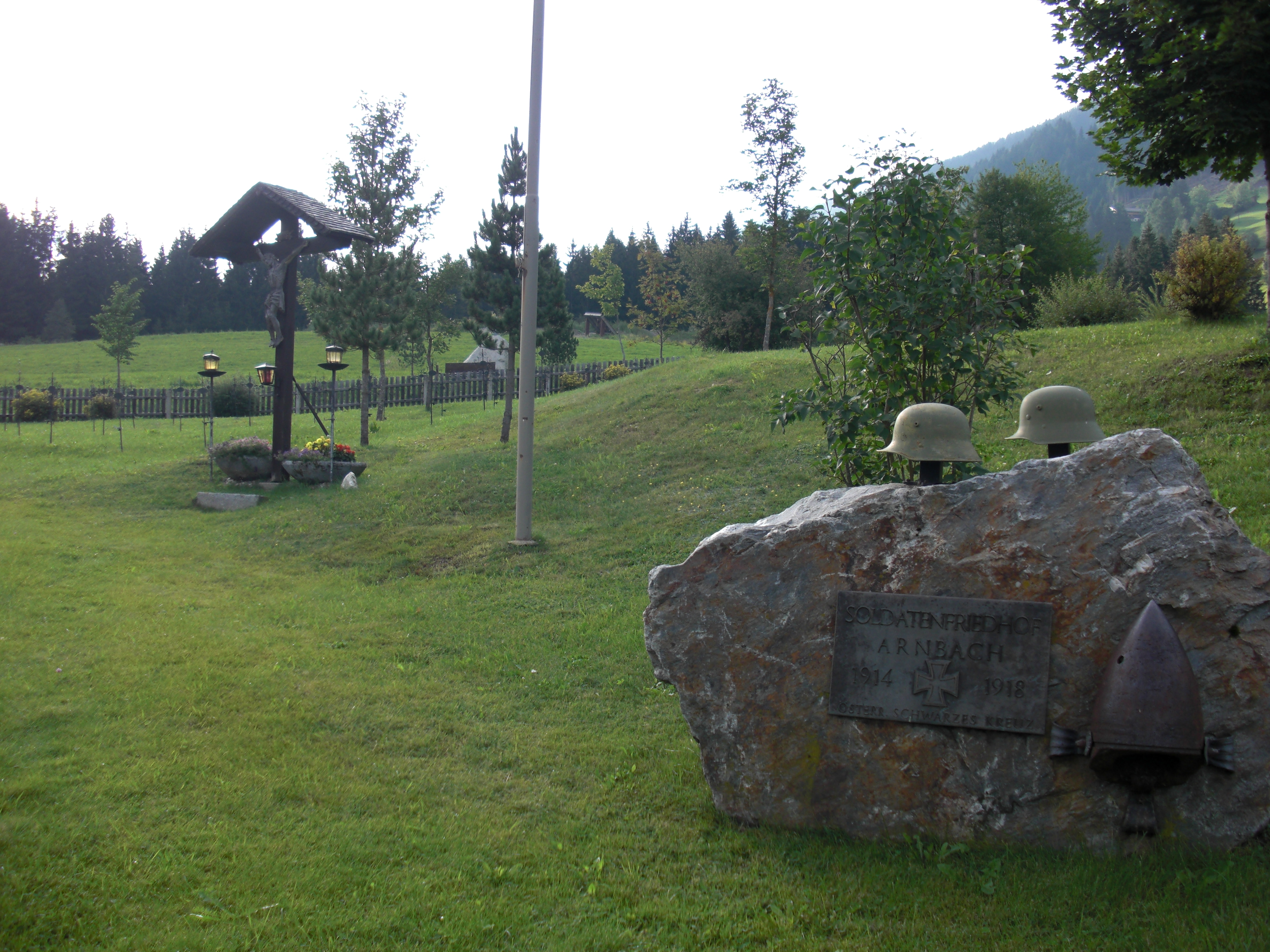 Kriegerfriedhof im Sillianer Ortsteil Arnbach in Osttirol, Österreich.